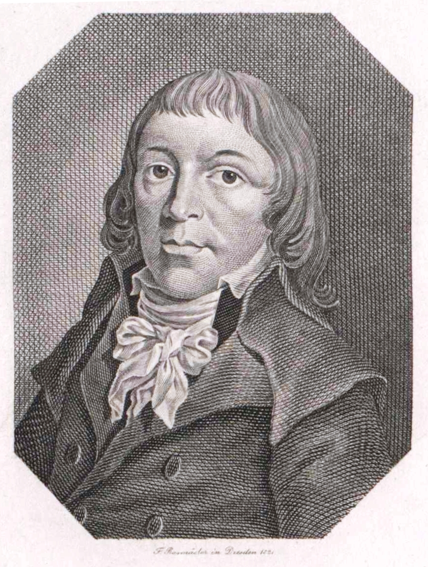 Portrait des Dichters Ludwig Gotthard Kosegarten.